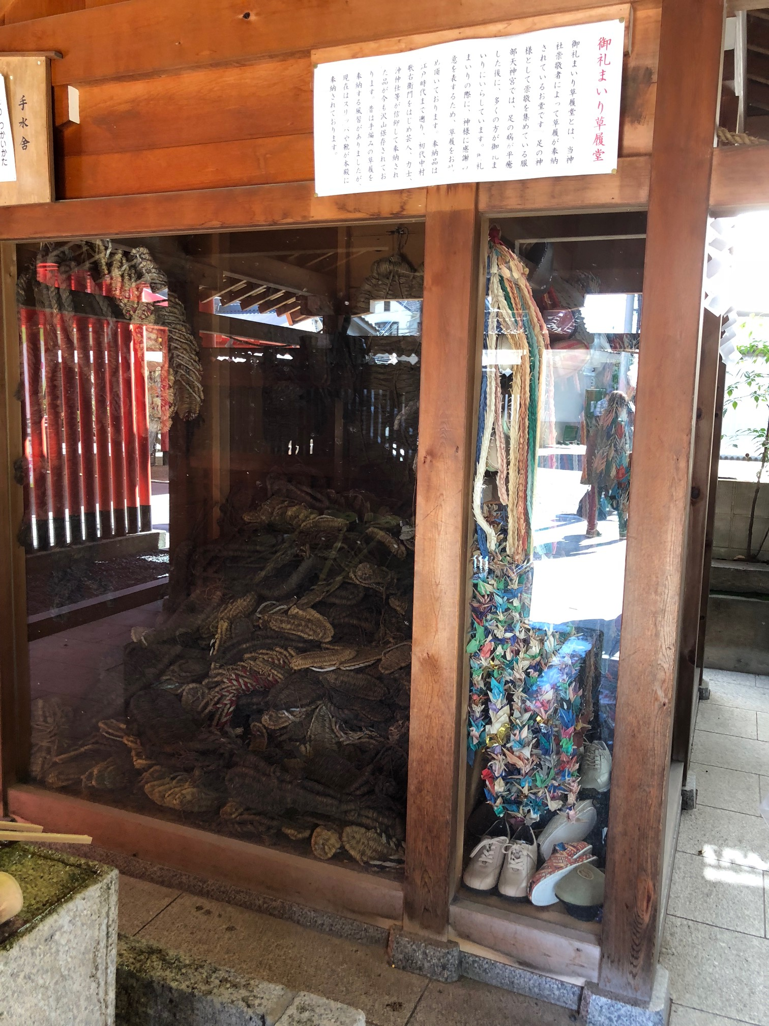 服部天神宮 わらじ堂